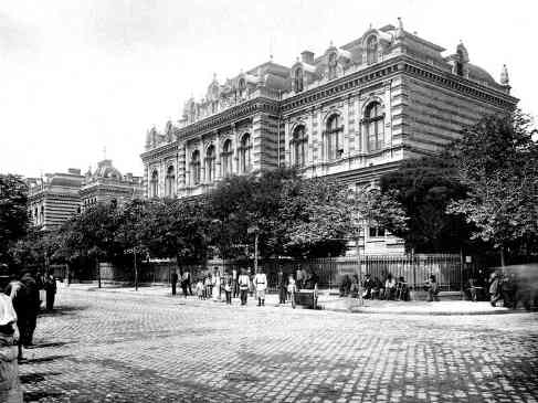 Spitalul Brancovenesc bucuresti